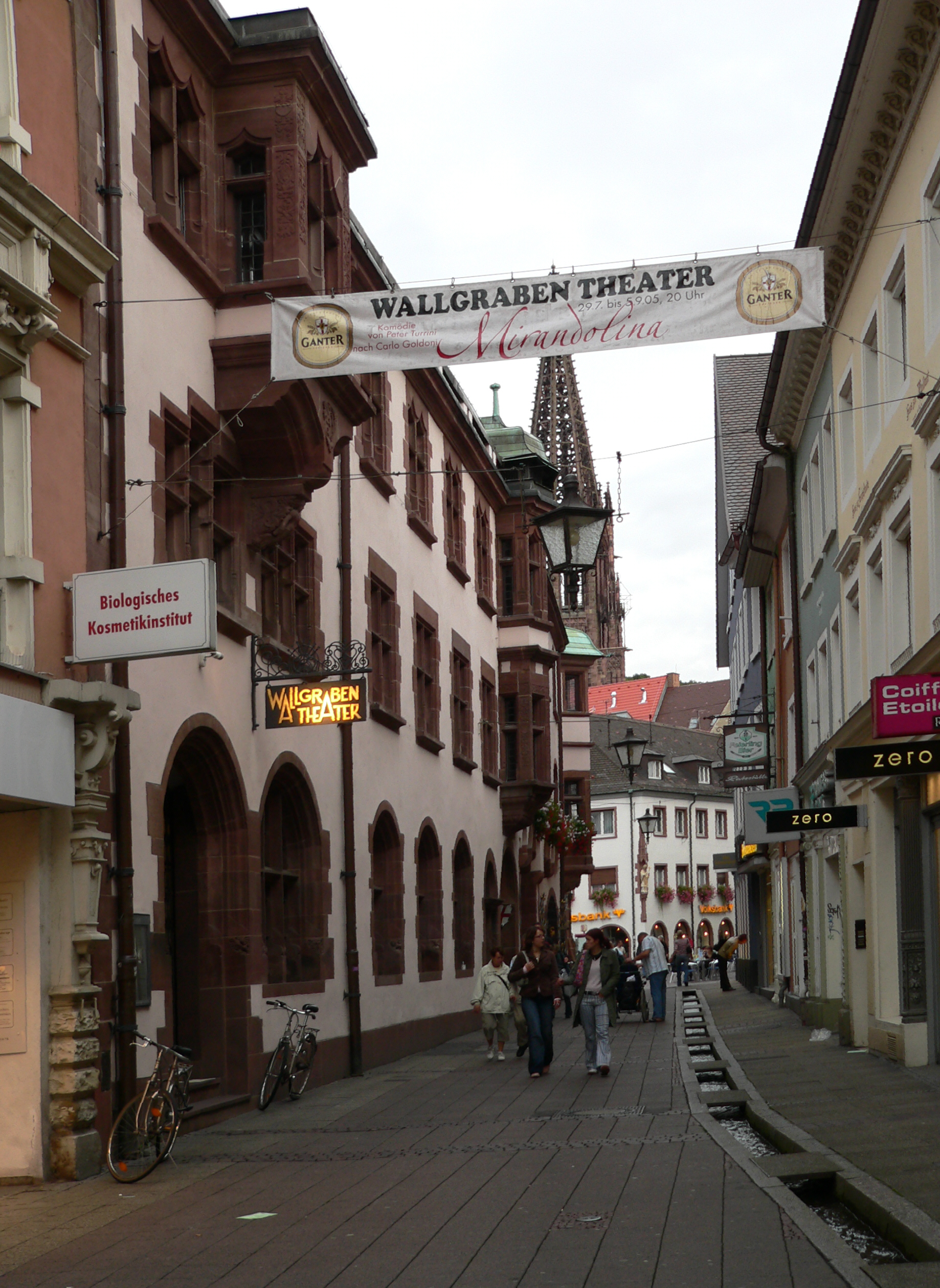 Wallgrabentheater und Freiburger Bächle in der Rathausgasse.